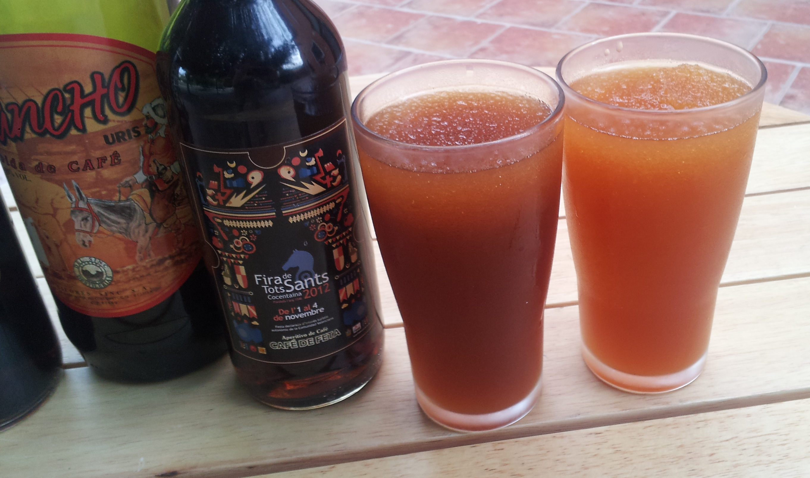 Mentira amb llimó de Cocentaina (Ibense). A la dreta, got només amb aigua-llima, a l'esquerra, got amb el granissat mesclat amb el café-licor.